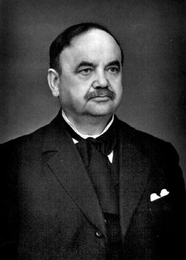 Føroyskt: Jákup Dahl, próstur